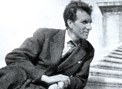 Il regista e storico del cinema Francesco Pasinetti (1911-1949), in una immagine degli anni quaranta